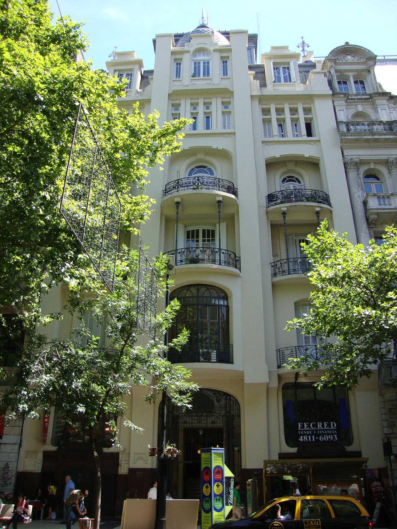 Frente del Palacio Vera, ex residencia Díaz Vélez y ex Hotel Centenario. Avenida de Mayo nº 769.